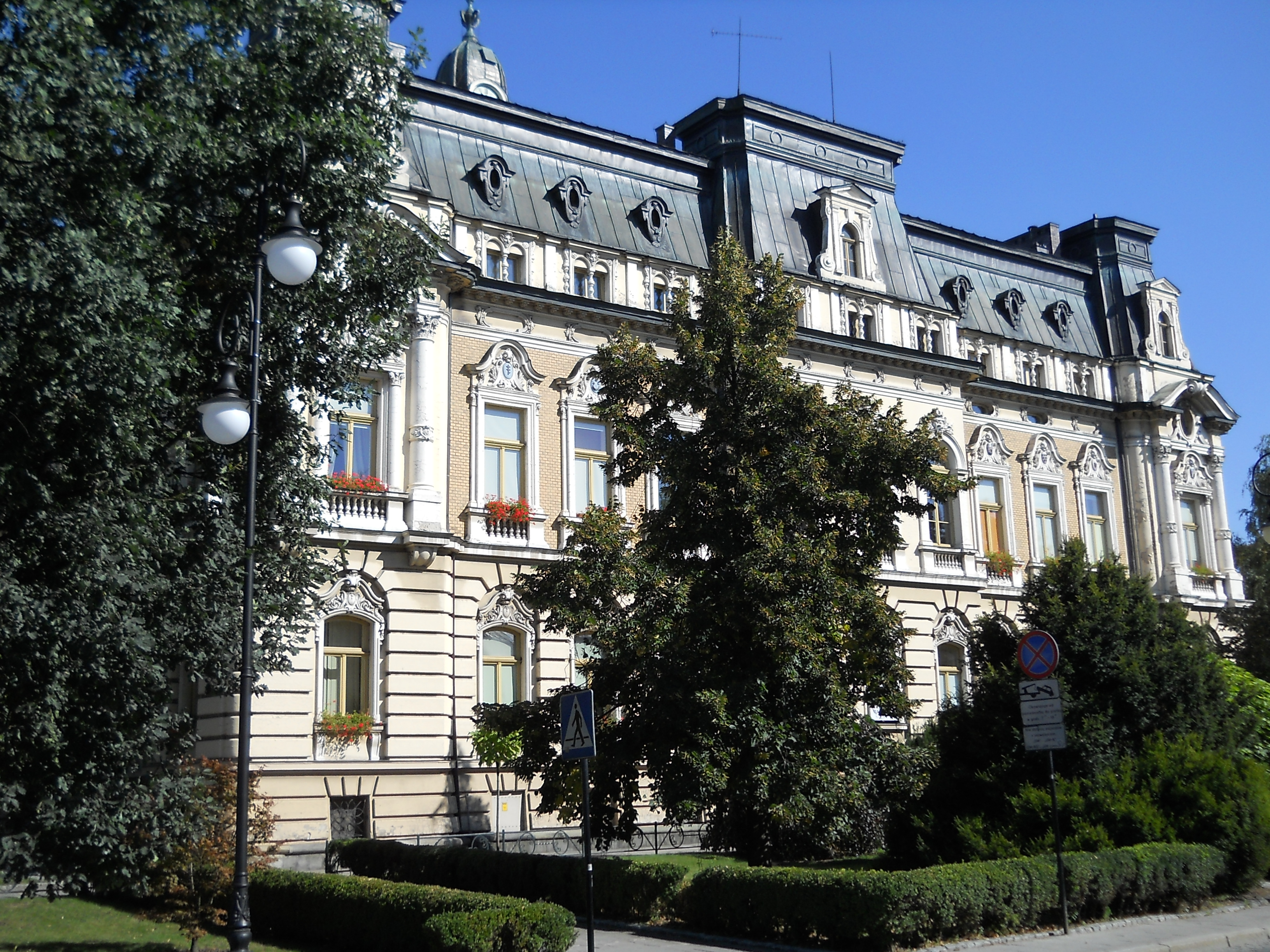 Nowy Sącz, ratusz, 1895